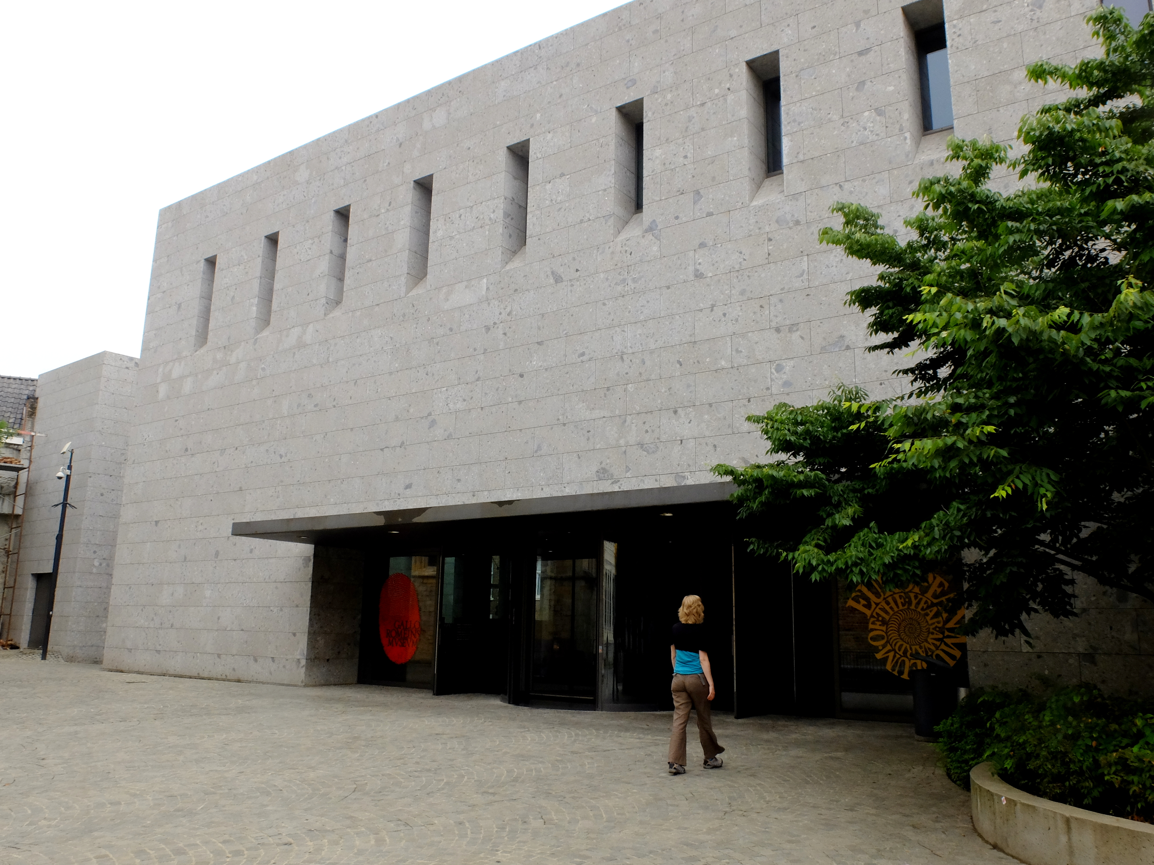 Gallisch-Römisches Museum Tongern.